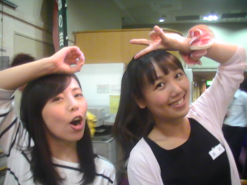 左：和泉杏 右：浜名ランチ